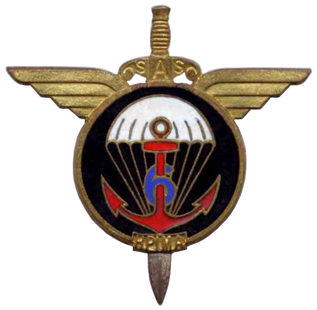 Insigne régimentaire du 6e Régiment de parachutistes d'infanterie de marine (6e RPIMa)